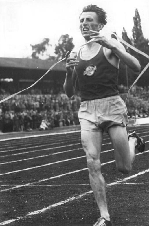 Havenstein Zentralbild Erfurt-Wlocka Bey-Sch. 21.7.1956 VII. DDR-Leichtathletik-Meisterschaften in Erfurt. In der Zeit vom 20.7. bis zum 22. 7. 1956 finden in Erfurt die VII. Leichtathletik-Meisterschaften der DDR in den Staffel- und Einzelwettbewerben der Männer und Frauen statt. UBz: Die erste Entscheidung fiel am Freitag Abend im 10 000-m-Lauf. Der siegreiche Havenstein (Vorwärts) zerreist nach 30:04,8 Min. das Zielband. - AB.21.7. KP.23.7.